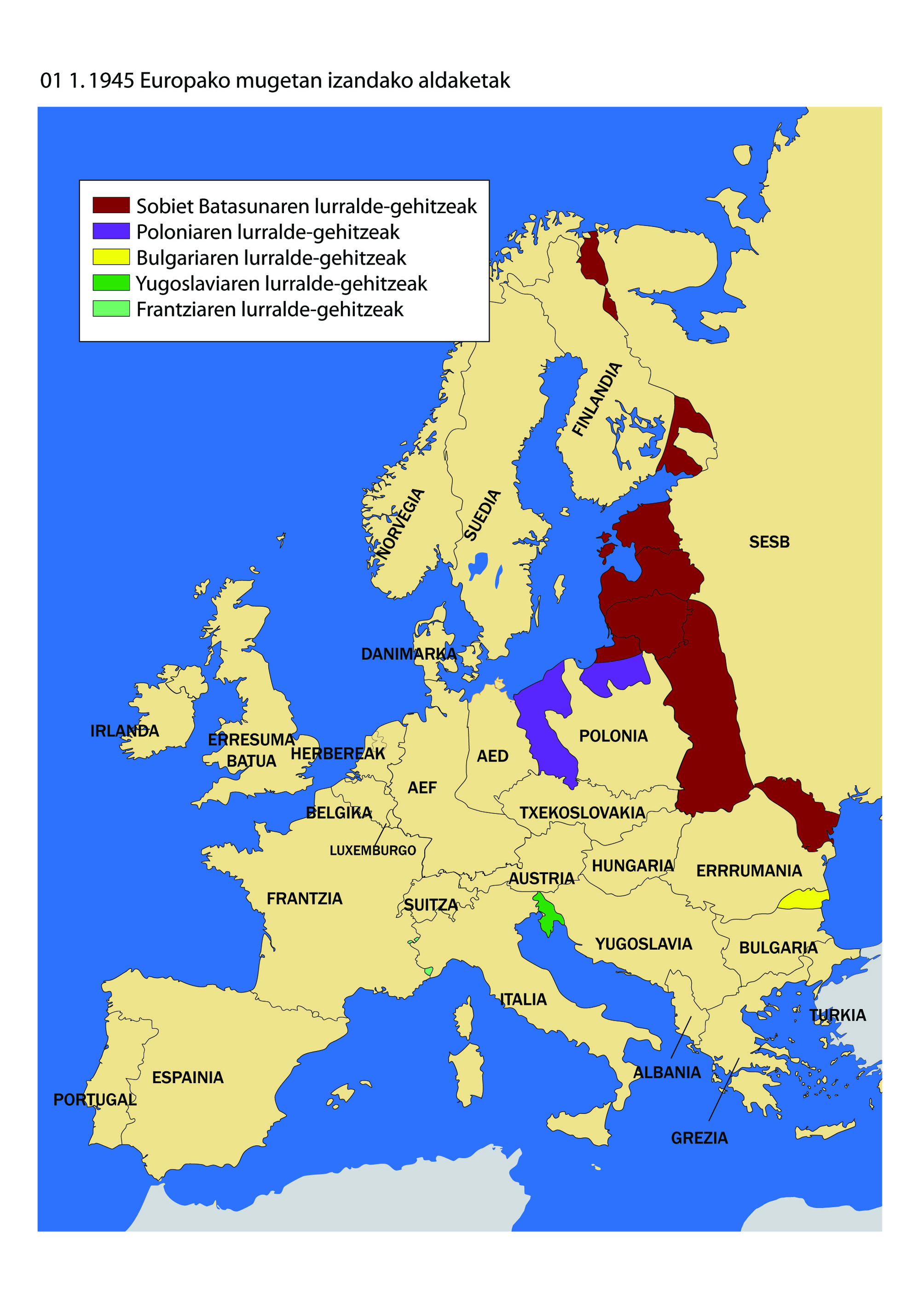 1945 Europako mugetan izandako aldaketak, UEUren liburutik hartua.